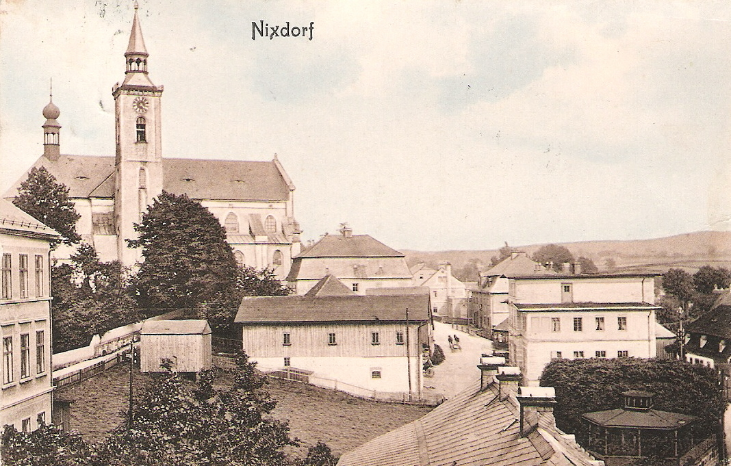 Mikulášovice na dobových záběrech